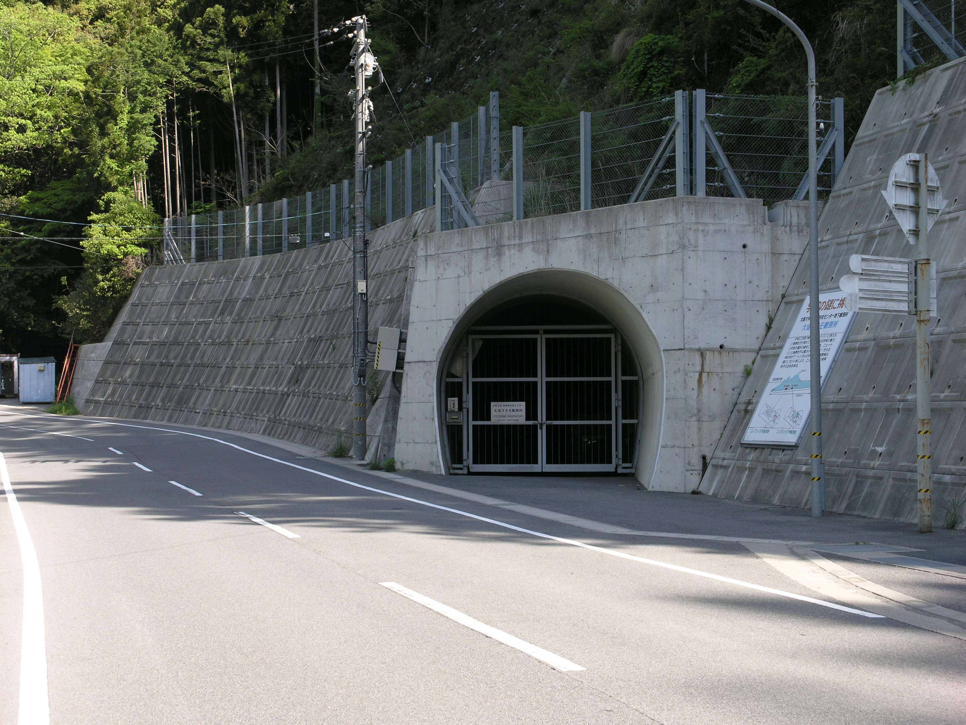 旧国鉄五新線天辻トンネル（五條市大塔町阪本）